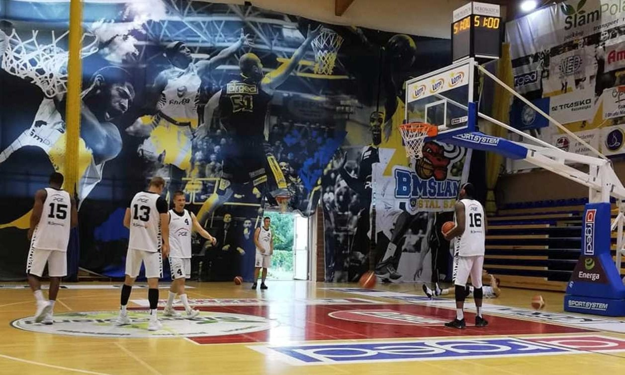 PGE Spójnia Stargard. Sparing w Ostrowie Wlk